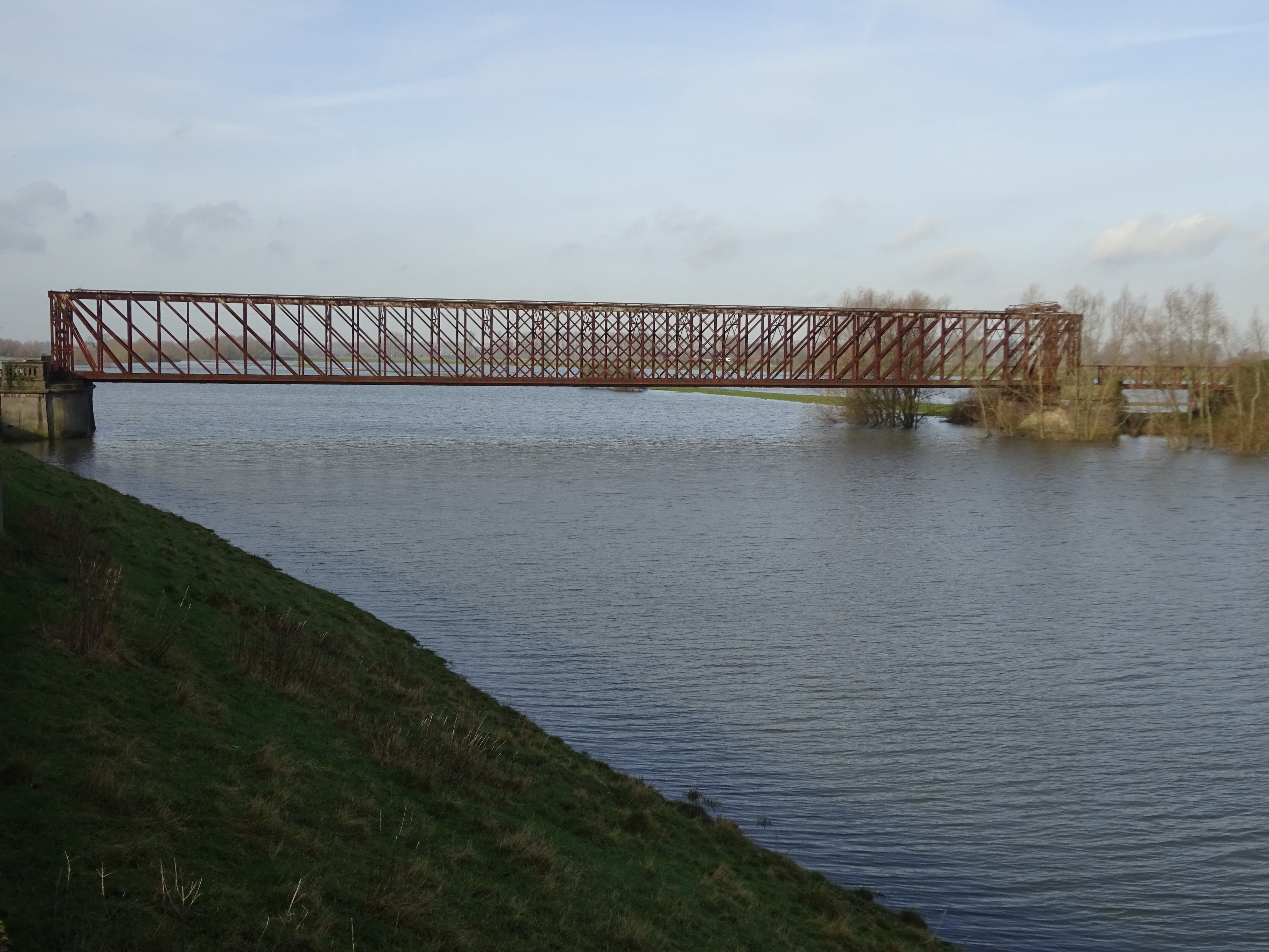 Kleve-Griethausen, ijzeren spoorbrug van de historische spoorlijn Zevenaar-Kleve